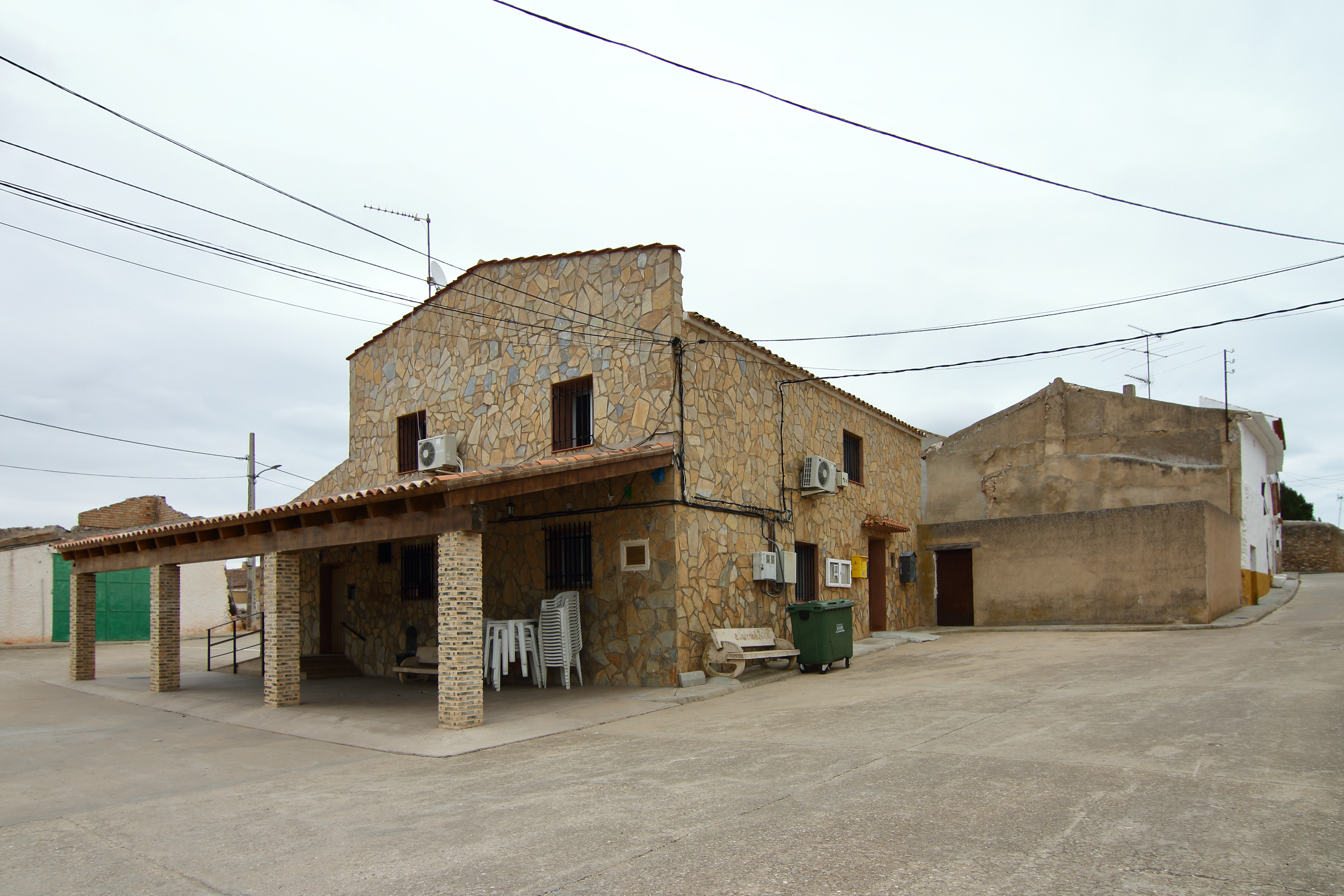 Torrubia del Castillo, Ayuntamiento